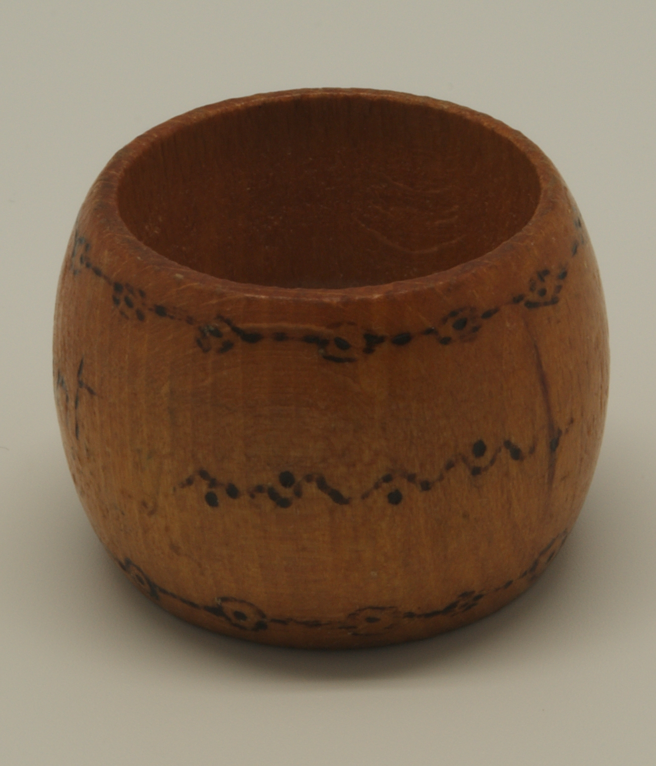 Rond de serviette pyrogravé